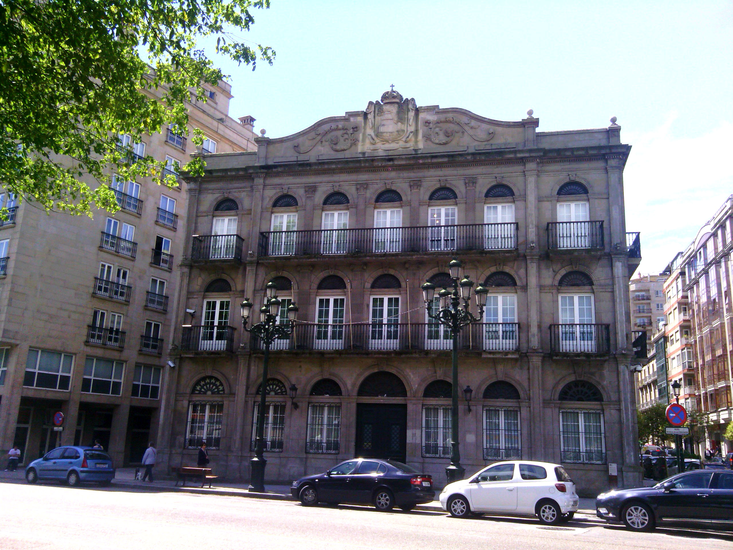 Fachada principal, que da a la calle Arenal, de la casa de Fernando Carreras (Vigo, Galicia).